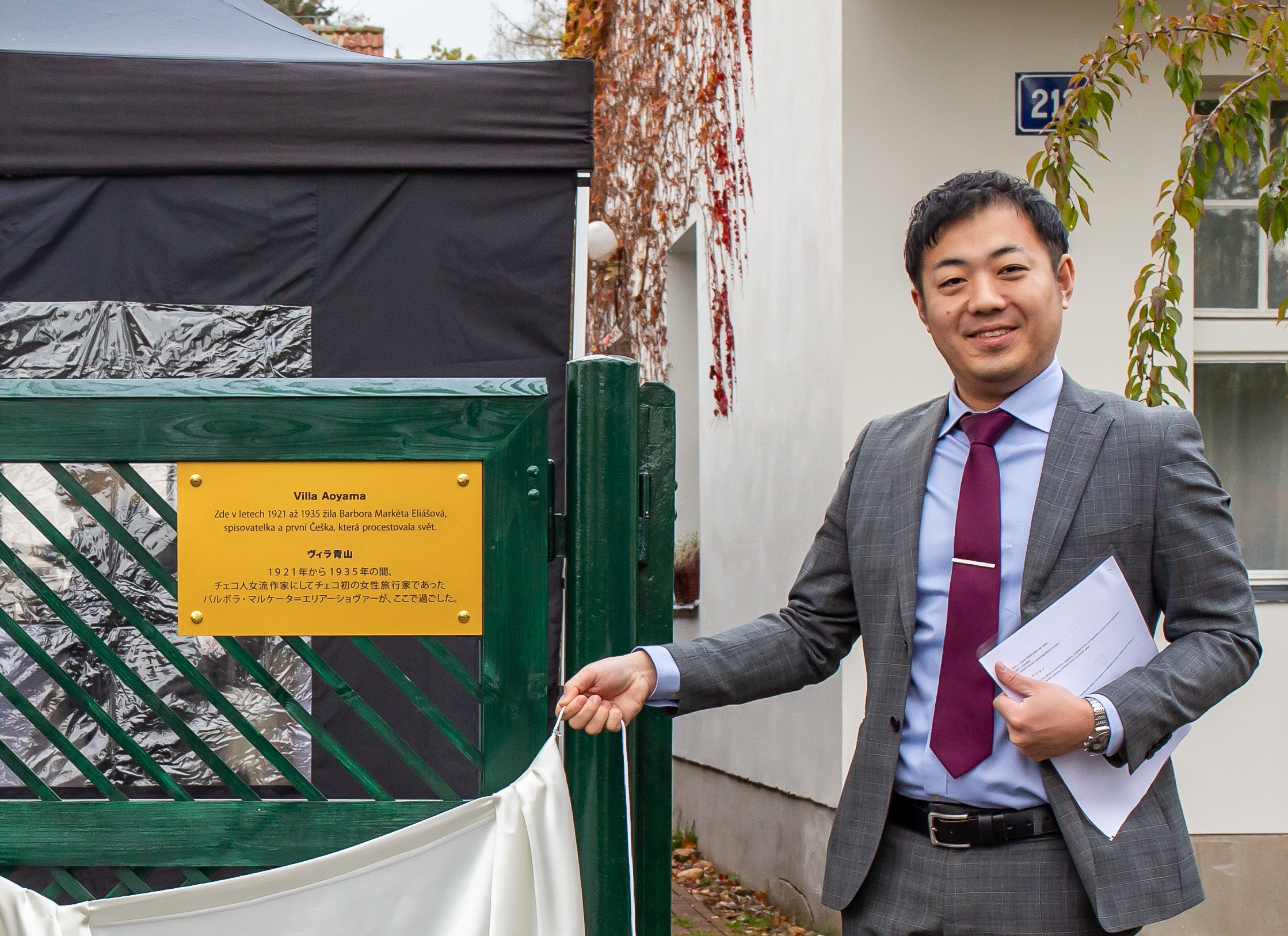 Kei Onishi, ředitel kulturního a informačního centra Japonského velvyslanectví při odhalení pamětní desky na vile Aoyama, kterou vlastnila a ve které bydlela v letech 1921-1935 Barbora Markéta Eliášová